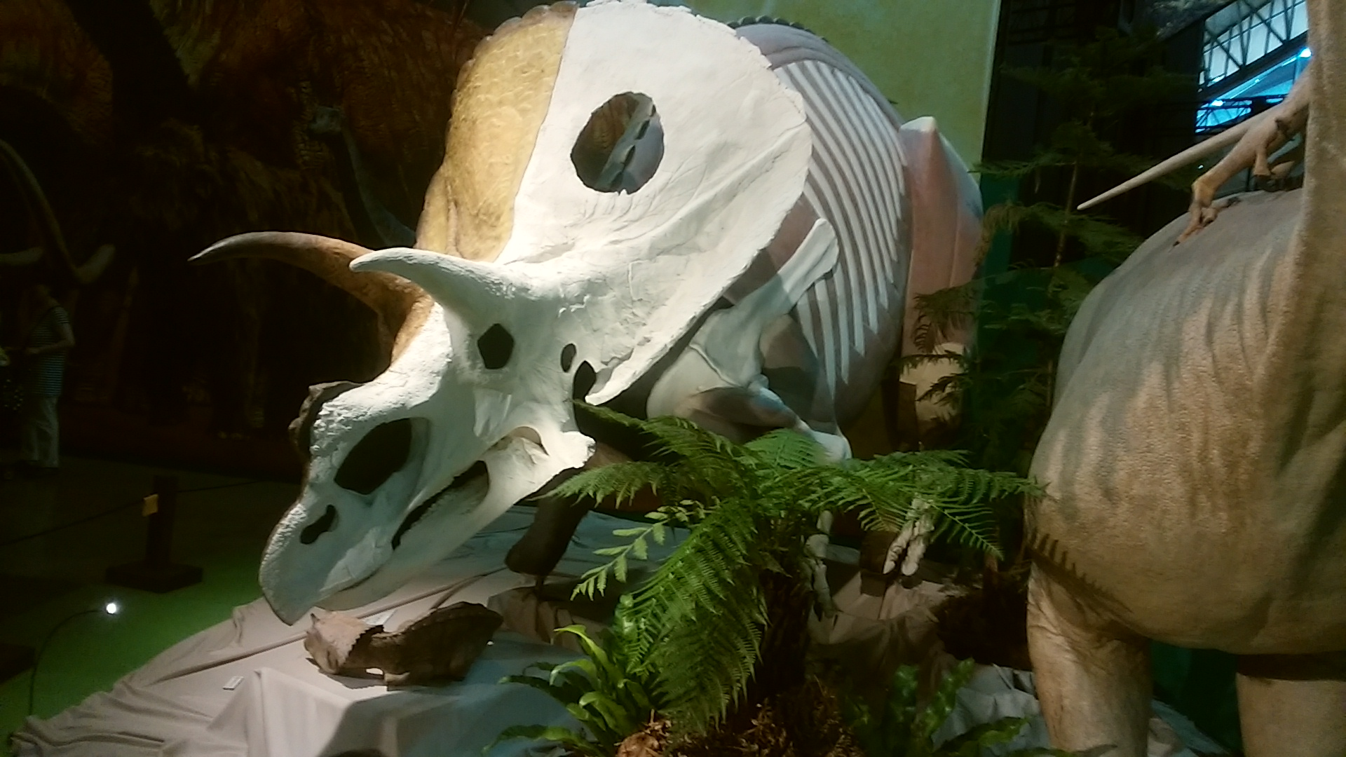 半分骨で半分生体復元されたトロサウルス